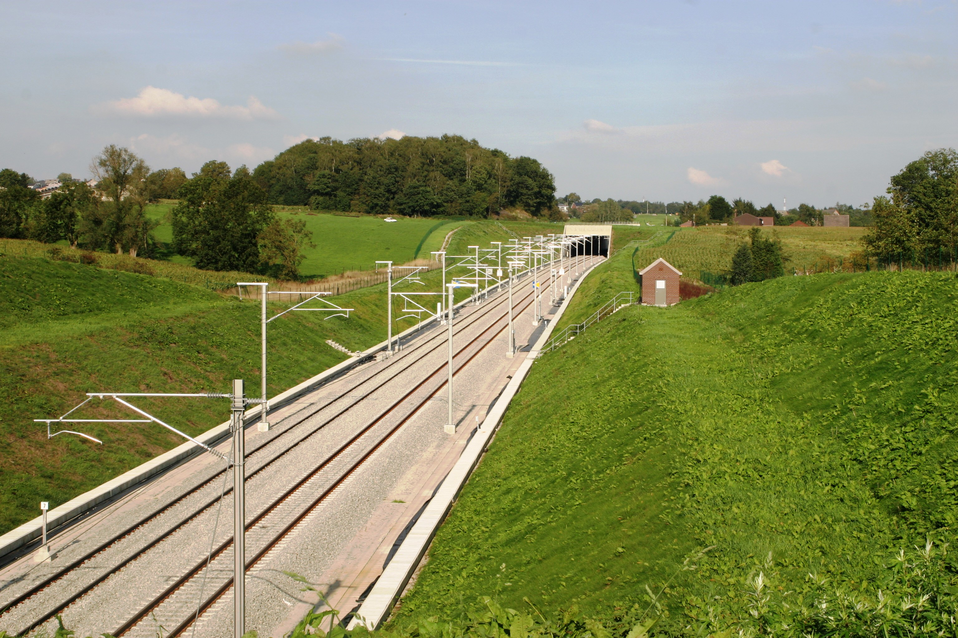 LGV no der Unterführung vun der Rue des Maçons zu Soumagne.